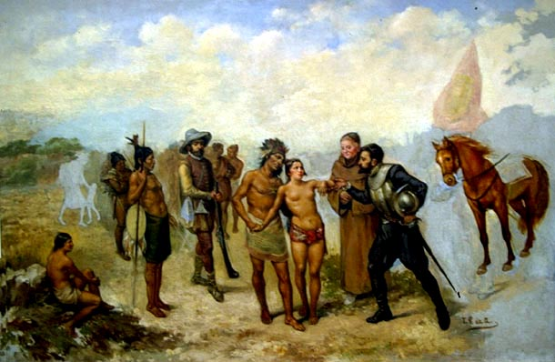 El gobernador español Coronado entrega a Dulcehé, joven que había sido raptada por un jefe indígena, a su hermano, el cacique Corrohore.